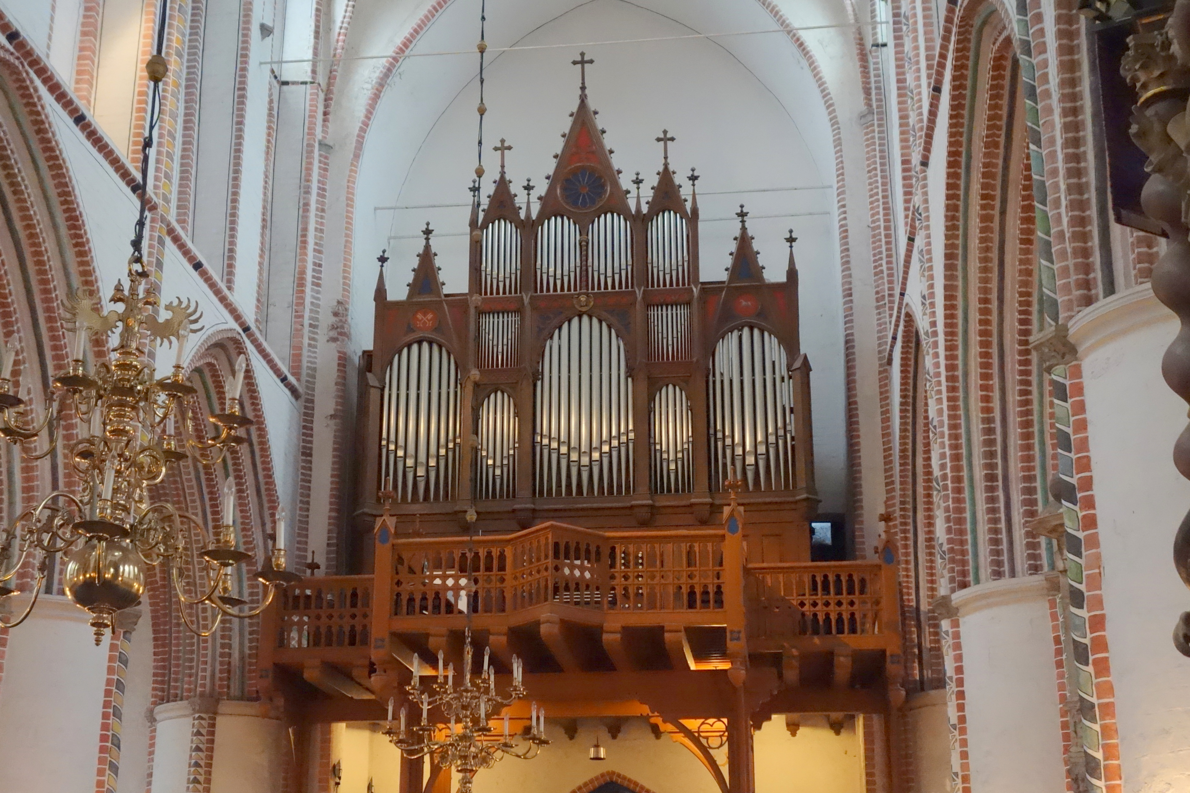 Hauptorgel in St.-Petri-Kirche Buxtehude, Landkreis Stade, Niedersachsen, Deutschland